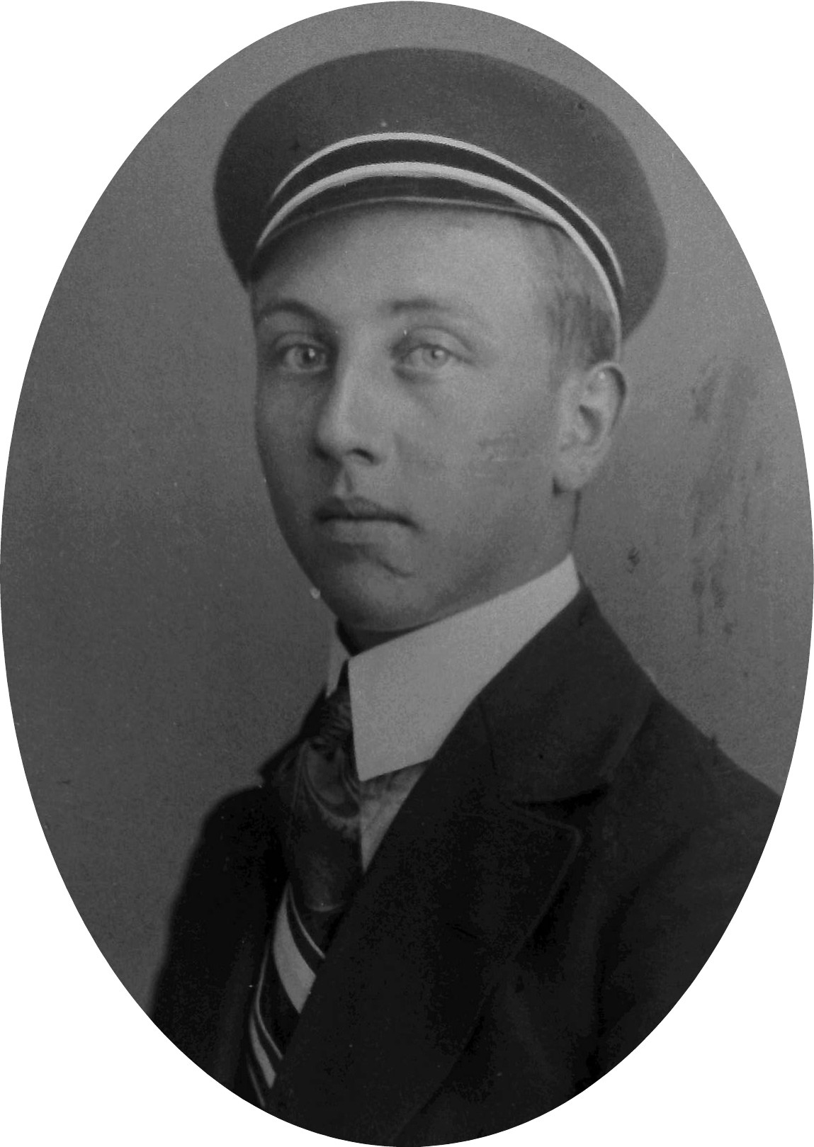 Porträtfotografie von Anton Oberniedermayr als Student in Marburg